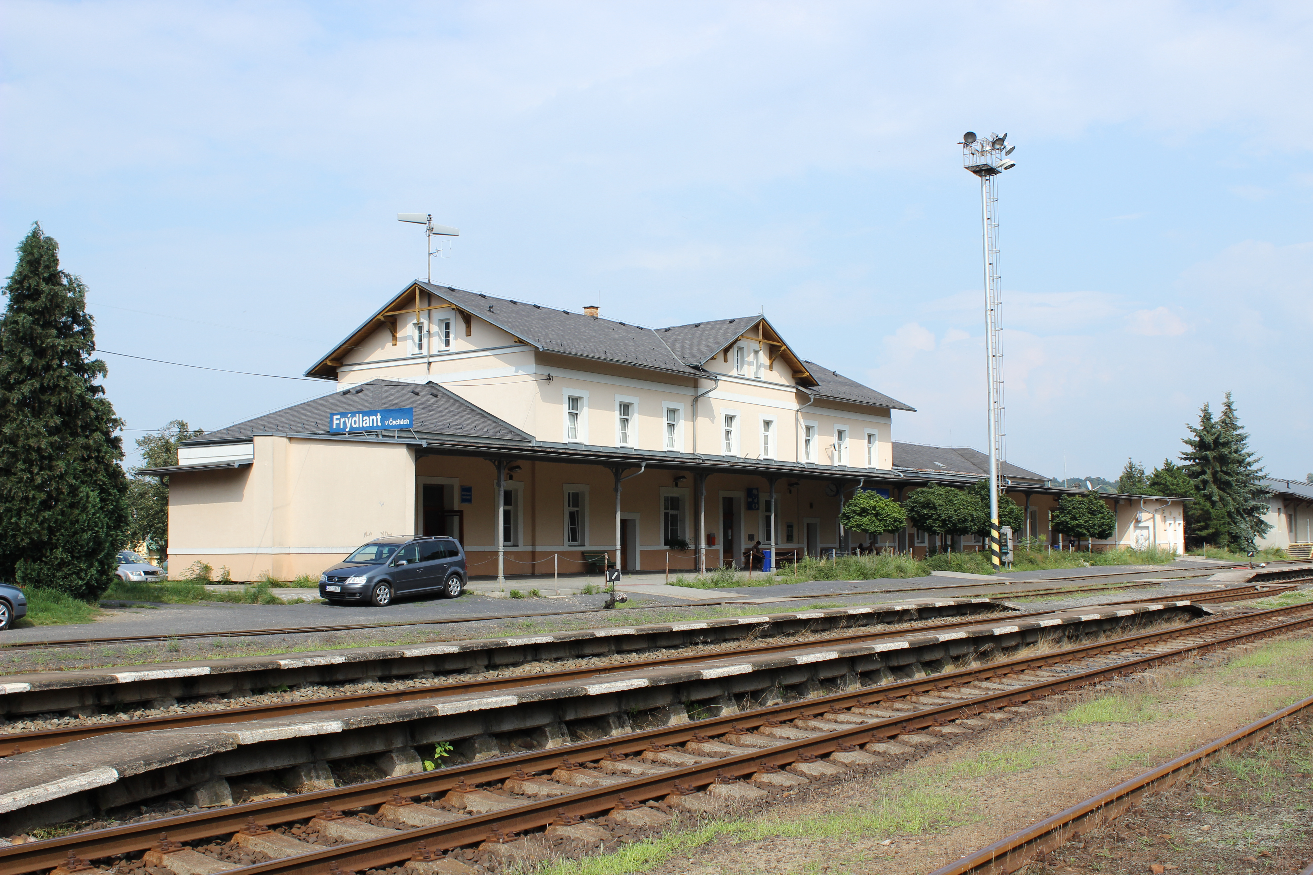 Staniční budova železniční stanice ve Frýdlantě.